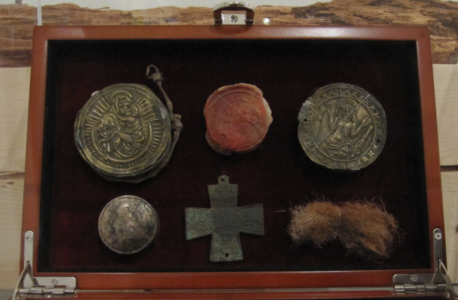 Weiheutensilien der Kirche St. Quirin in Aubing (heute München) von 1489. Aufgenommen in der historischen Ausstellung des "Fördervereins 1000 Jahre Aubing e.V." anlässlich der 1000-Jahr-Feierlichkeiten in Aubing, April 2010.